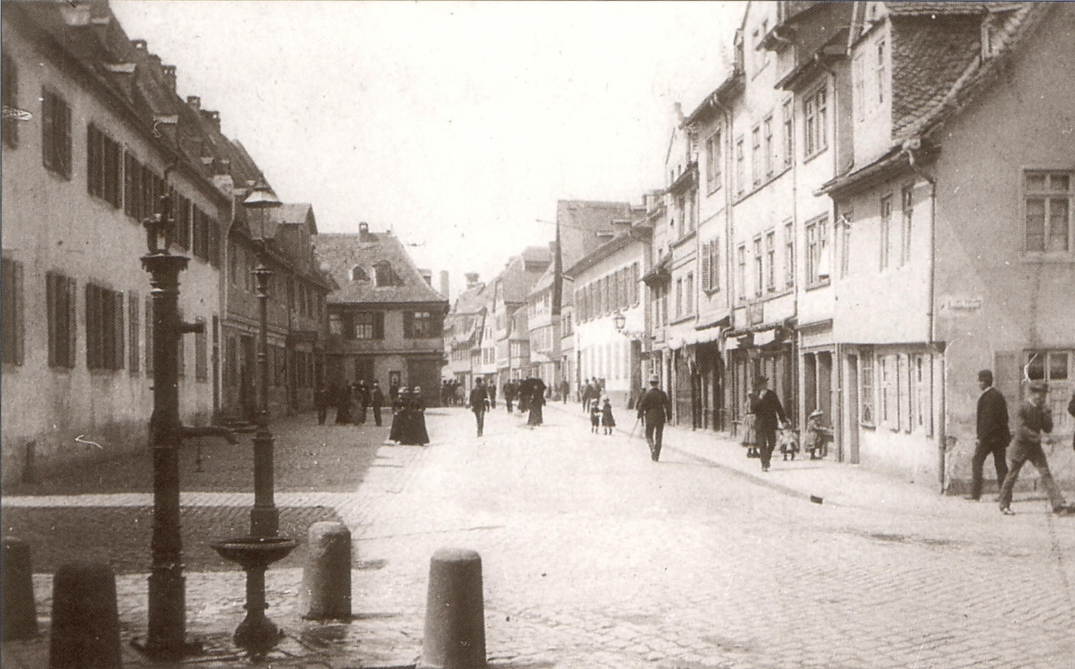 Höchster Hauptstraße (Bolongarostraße) um 1890, links vorne das ehem. Antoniterkloster, rechts hinten das Kronberger Haus